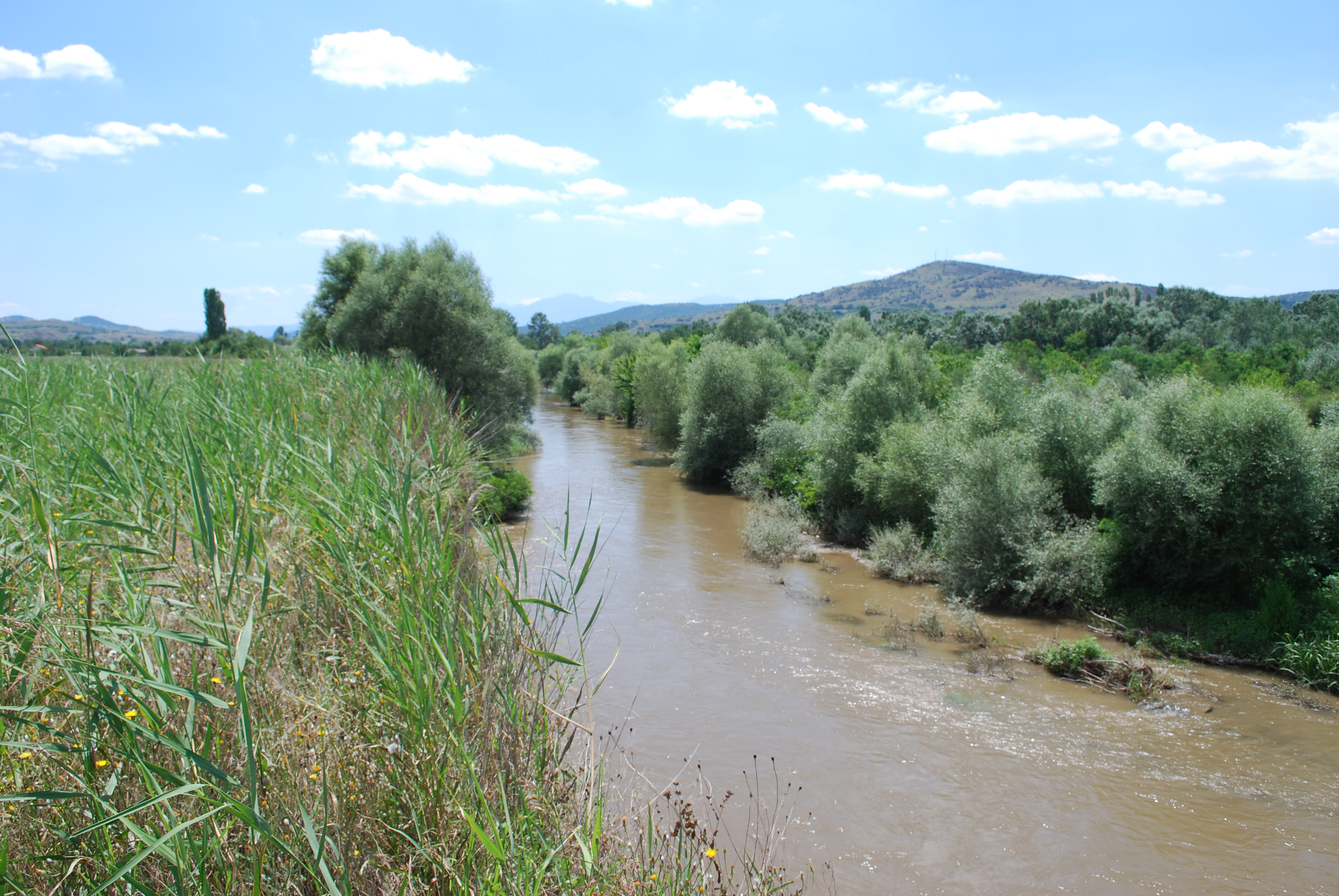 Винички Брег. Засекот што го прави реката Пчиња во близина на селото Горно Коњари, Скопје, Македонија